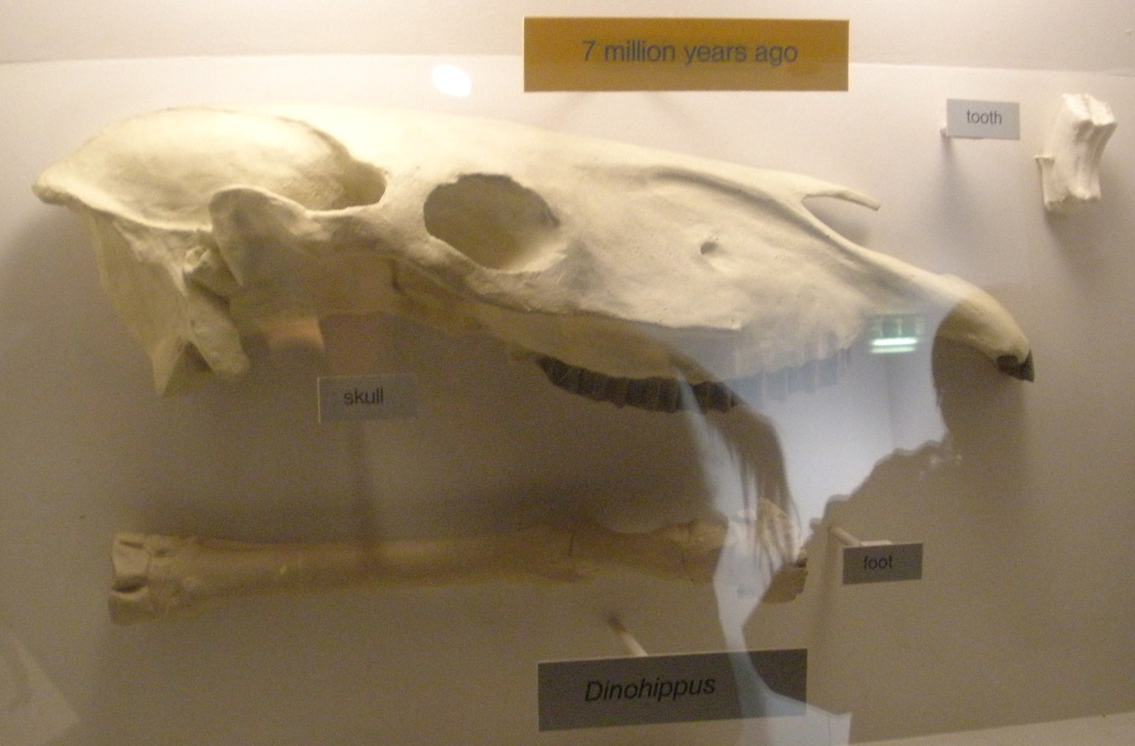 Fossil of Dinohippus, an extinct mammal -- Took the photo at Natural History Museum, London